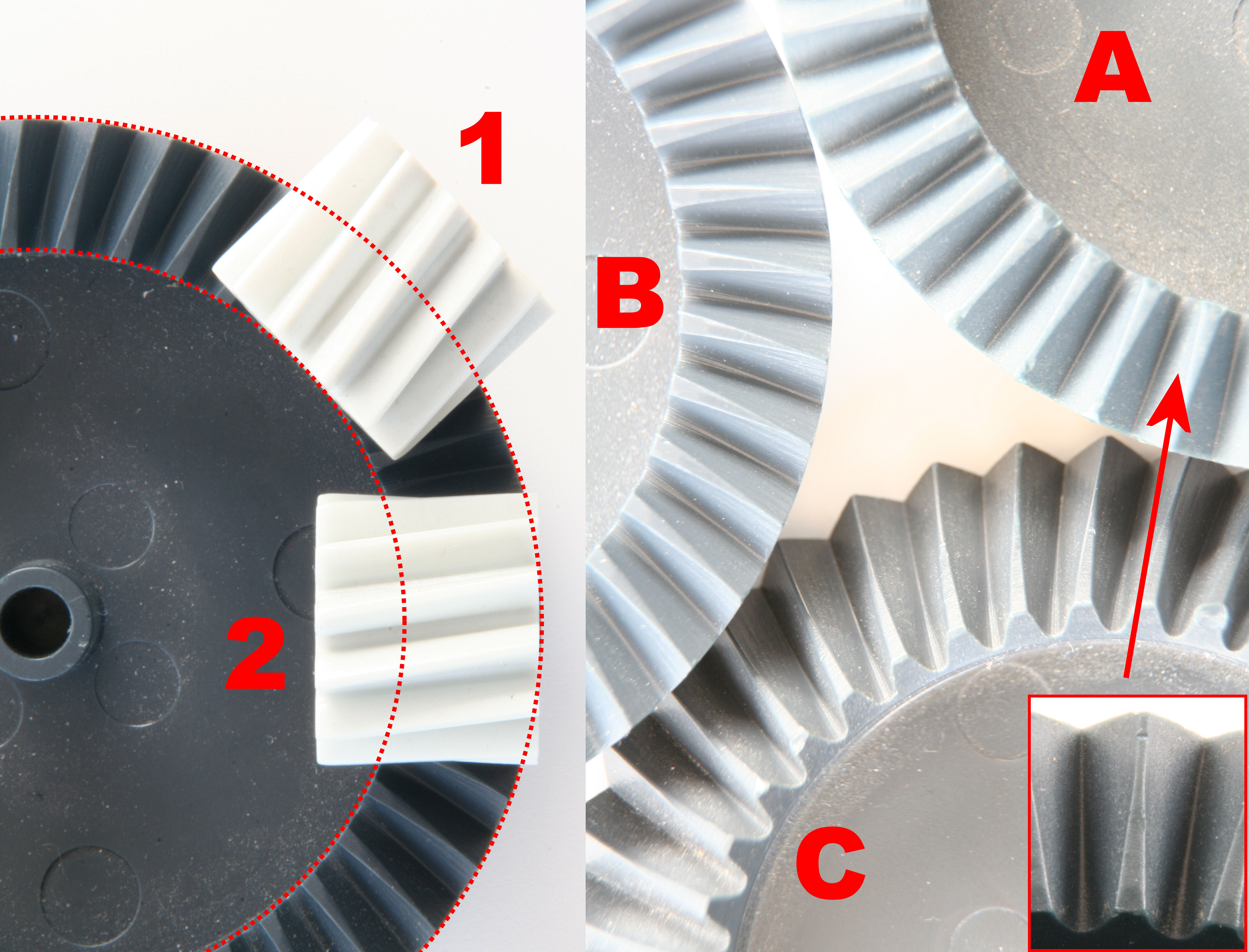 Das Bild zeigt mehrere Kronräder. Die Bilder wurden mit Kunststoffmodellen der niederländischen Firma Crown Gear B.V. (inzwischen insolvent) aufgenommen.